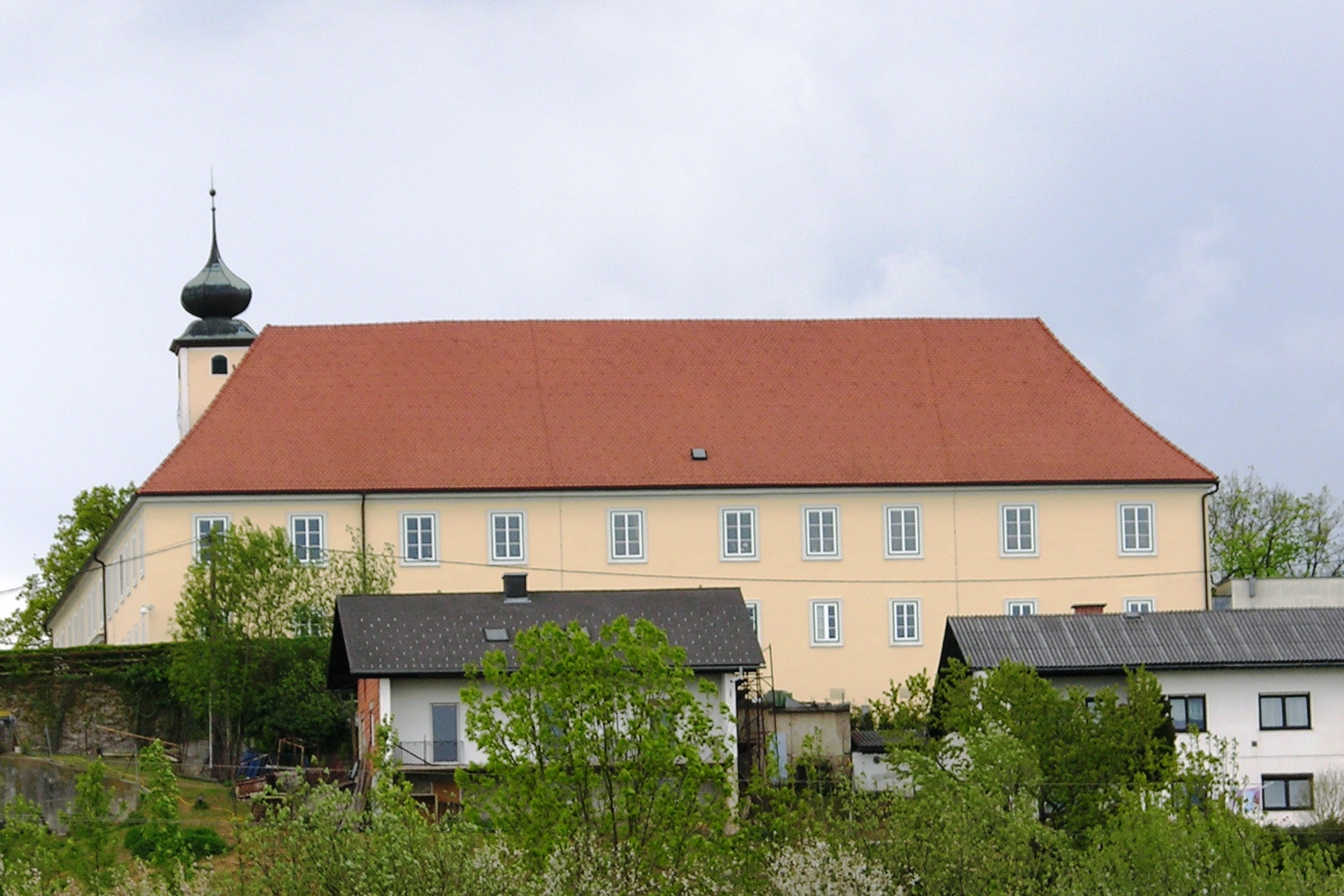 Lannach Schloß (2008)